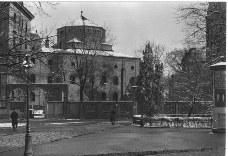 Dresden, alte Synagoge von Gottfried Semper, 1840 erbaut. Während der Reichspogromnacht (9./10. November 1938) niedergebrannt. Foto um 1910.